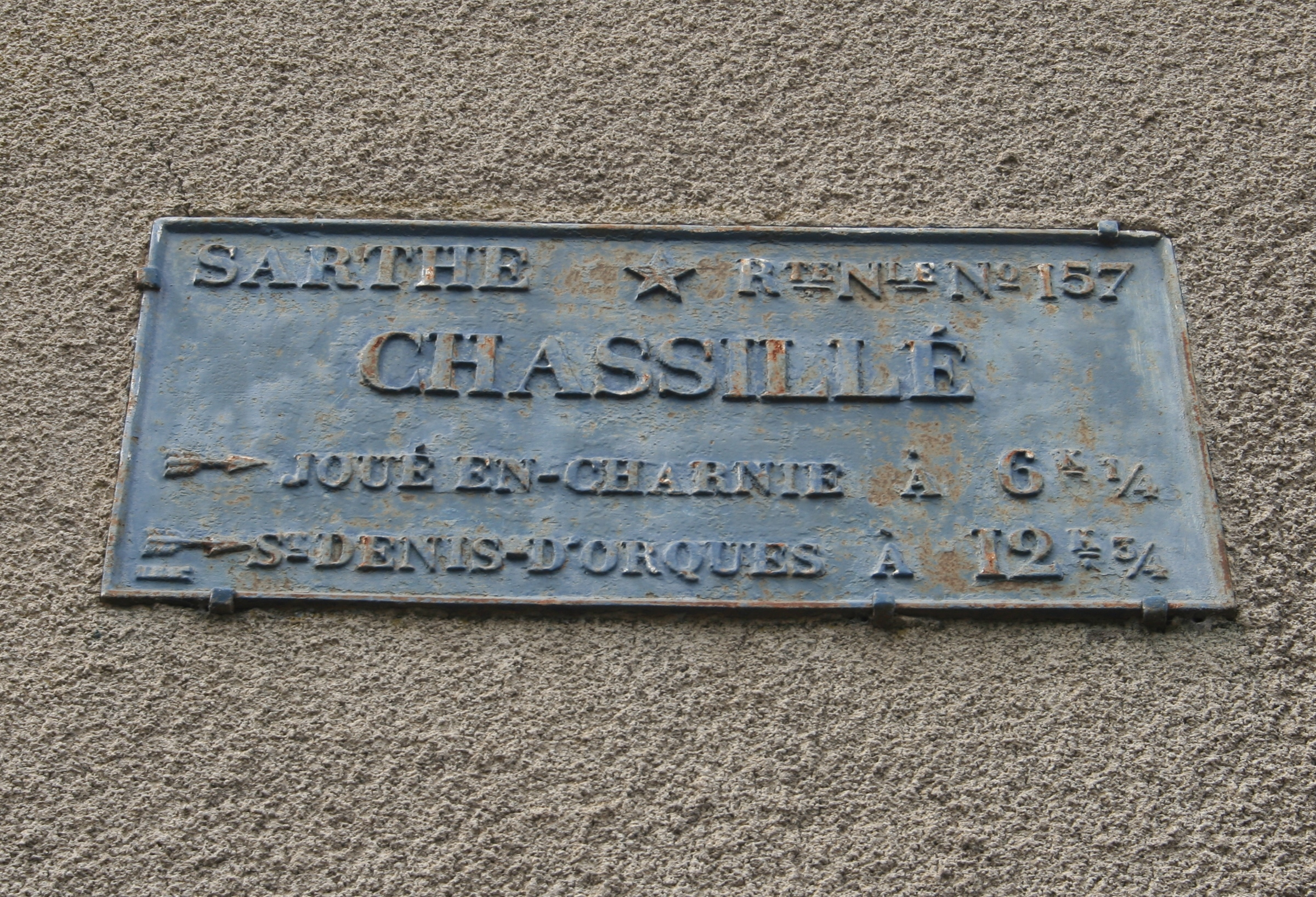 Plaque de cocher à Chassillé